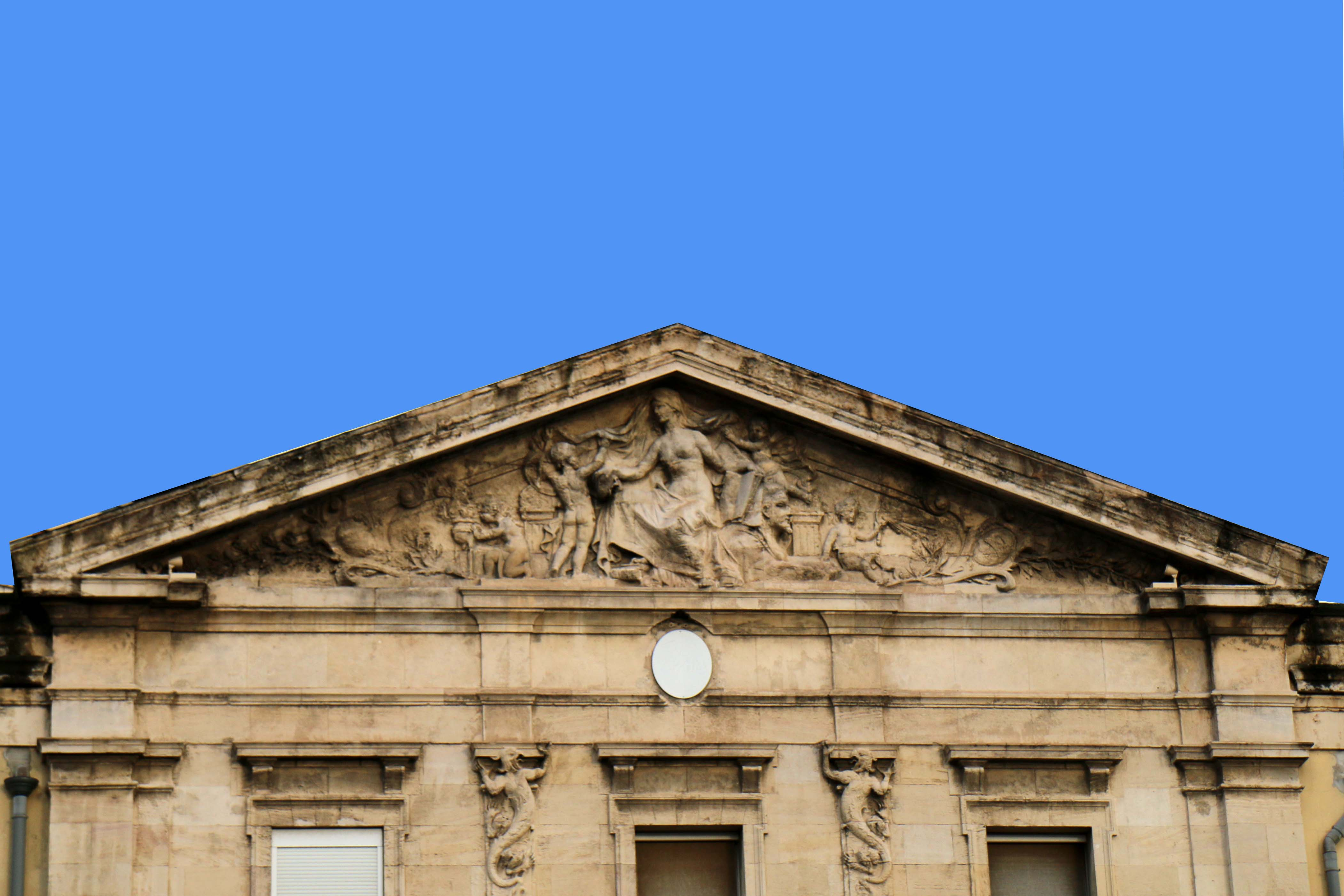 Fronton de l'ancien hôpital de la Timone à Marseille représentant des génies découvrant la science ; sculpture de Stanislas Clastrier (1857-1925).